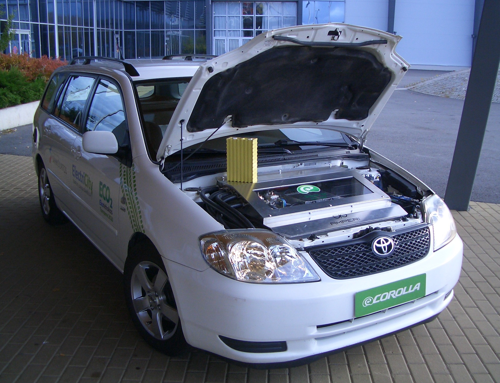 Description